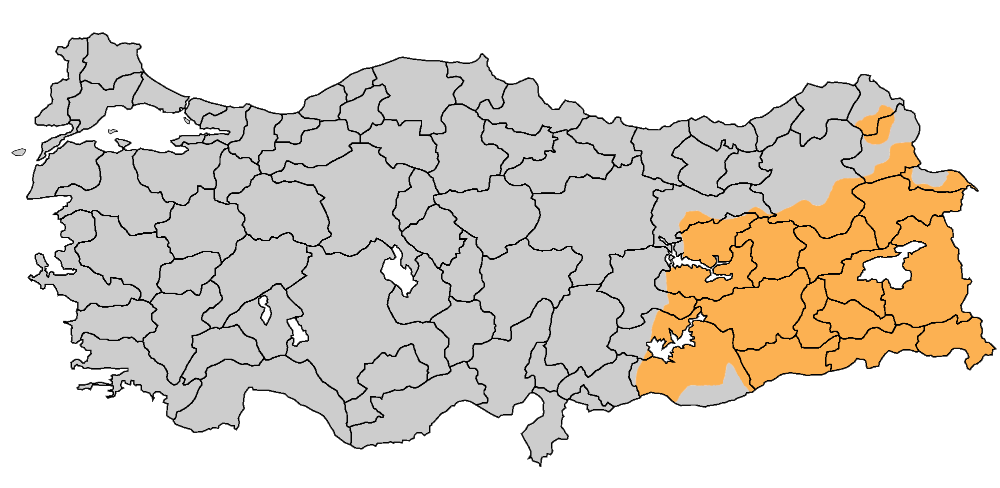 Kurdistan of Turkey